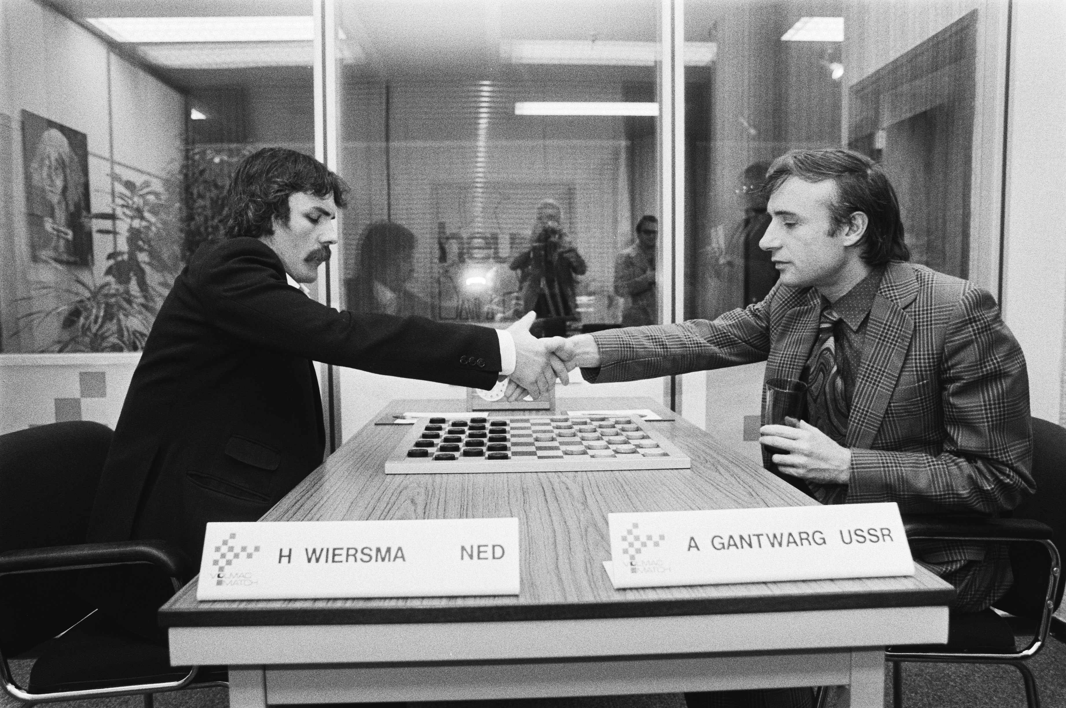 Voorlaatste ronde; Wiersma (l) en Gantwarg schudden elkaar de hand